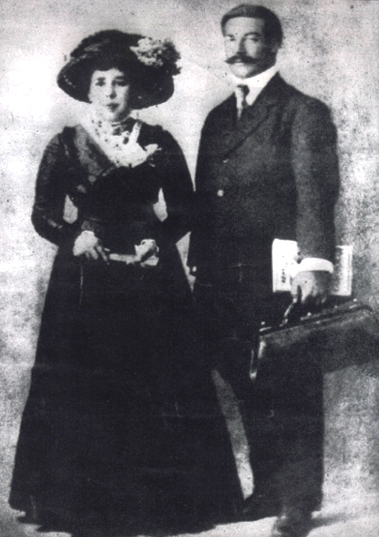 Luis Emilio Recabarren con su esposa, Guadalupe del Canto. Fotografía tomada antes de viajar a Buenos Aires.